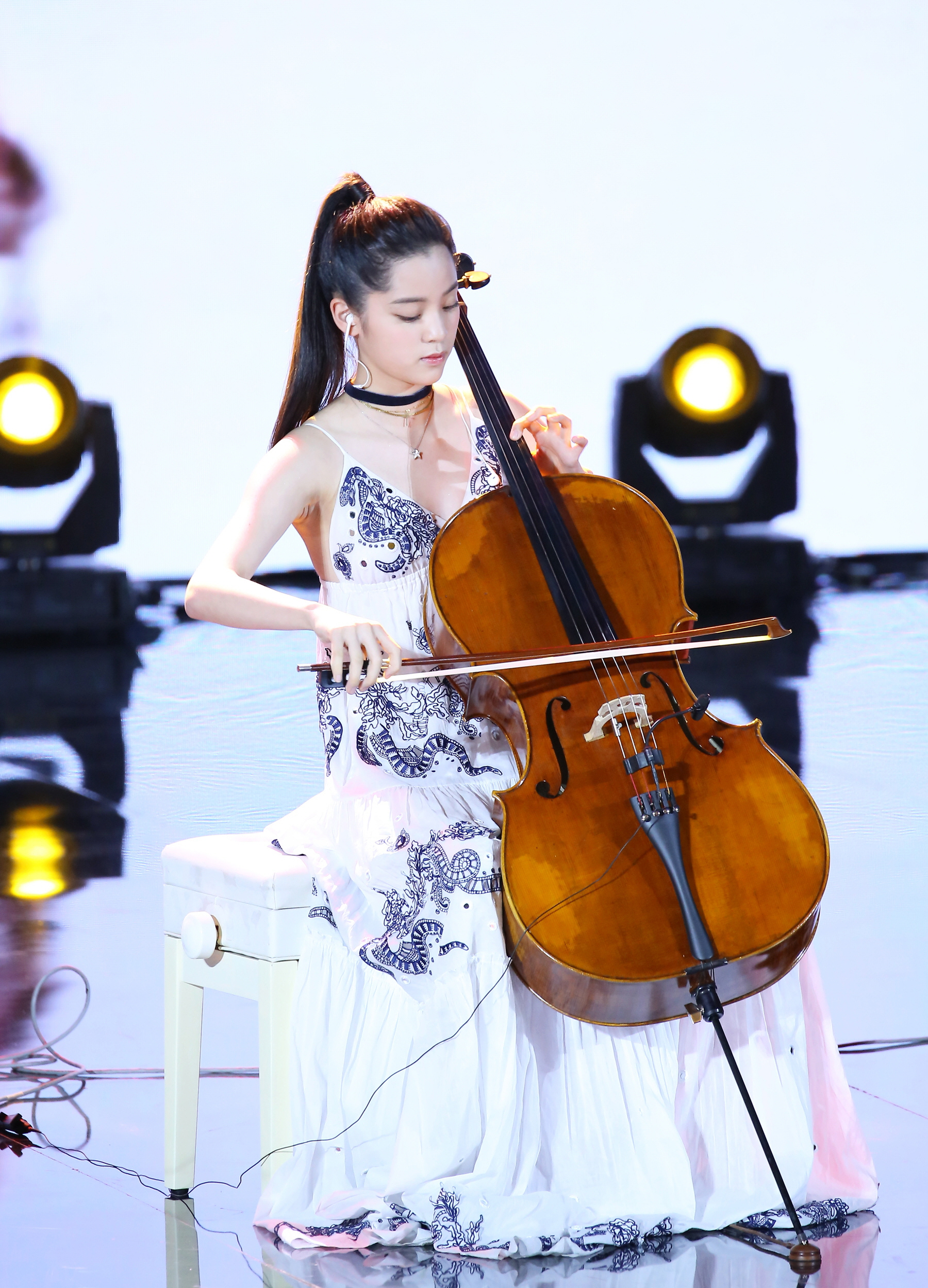 欧阳娜娜 微博电影之夜